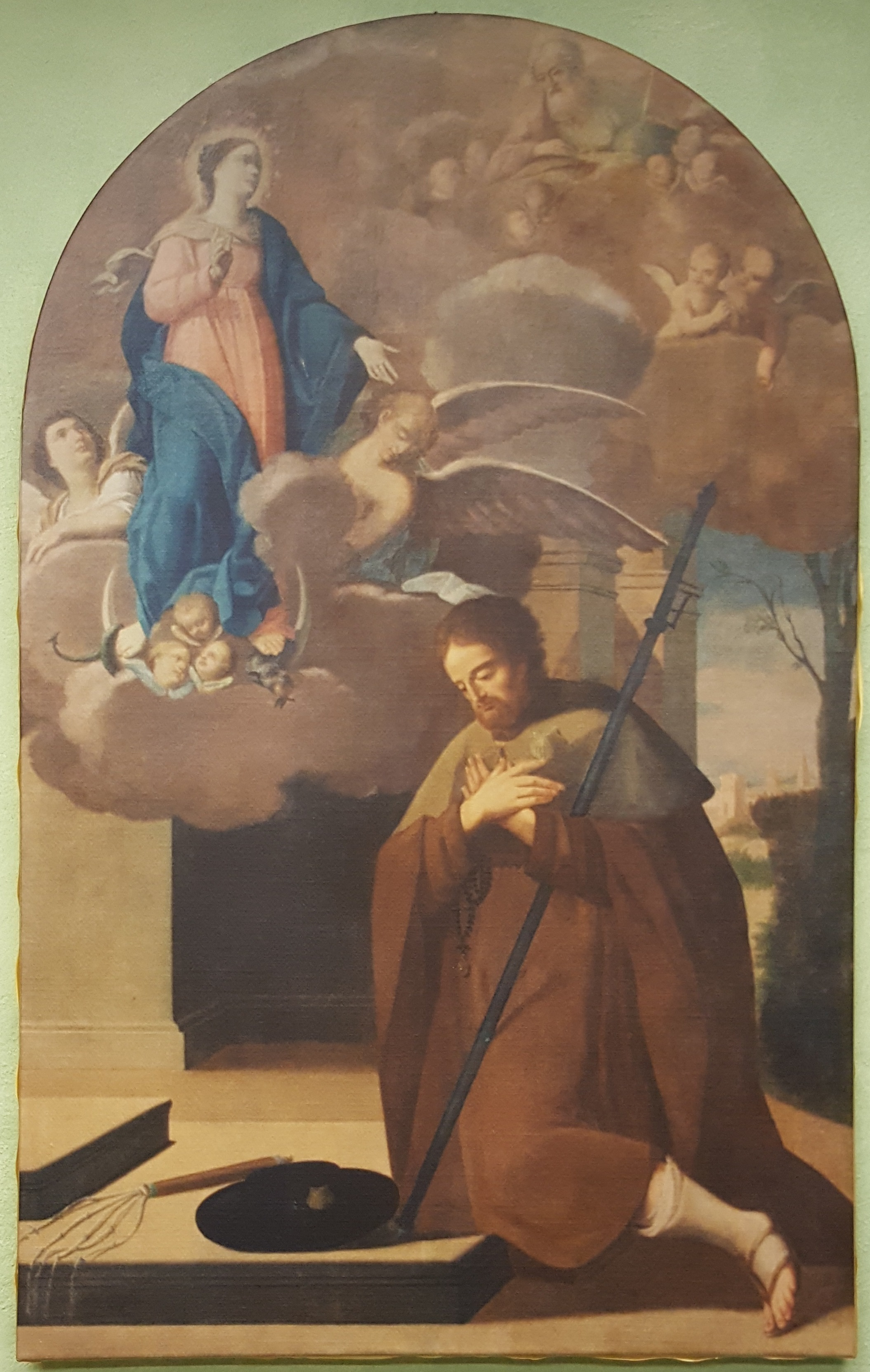 Copia di un dipinto ottocentesco con Madonna e angeli venerata da Santo Amato Ronconi This is a photo of a monument which is part of cultural heritage of Italy.